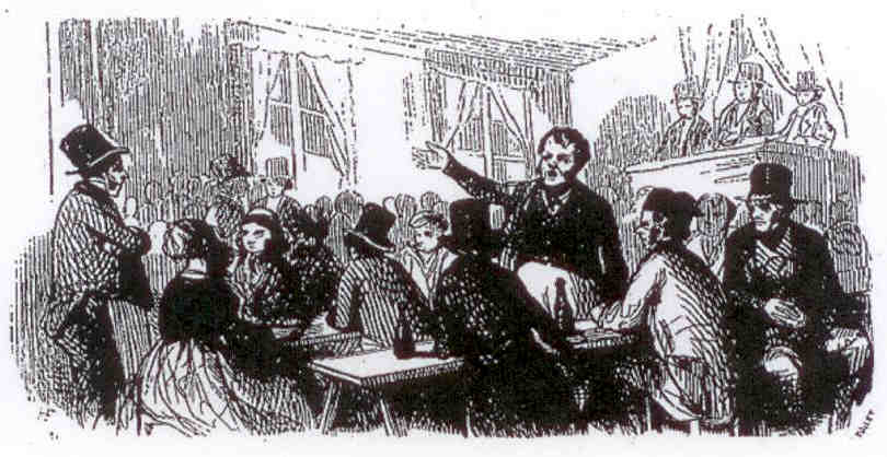 Une goguette parisienne vue par Daumier.